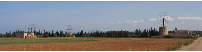 Sa Pobla